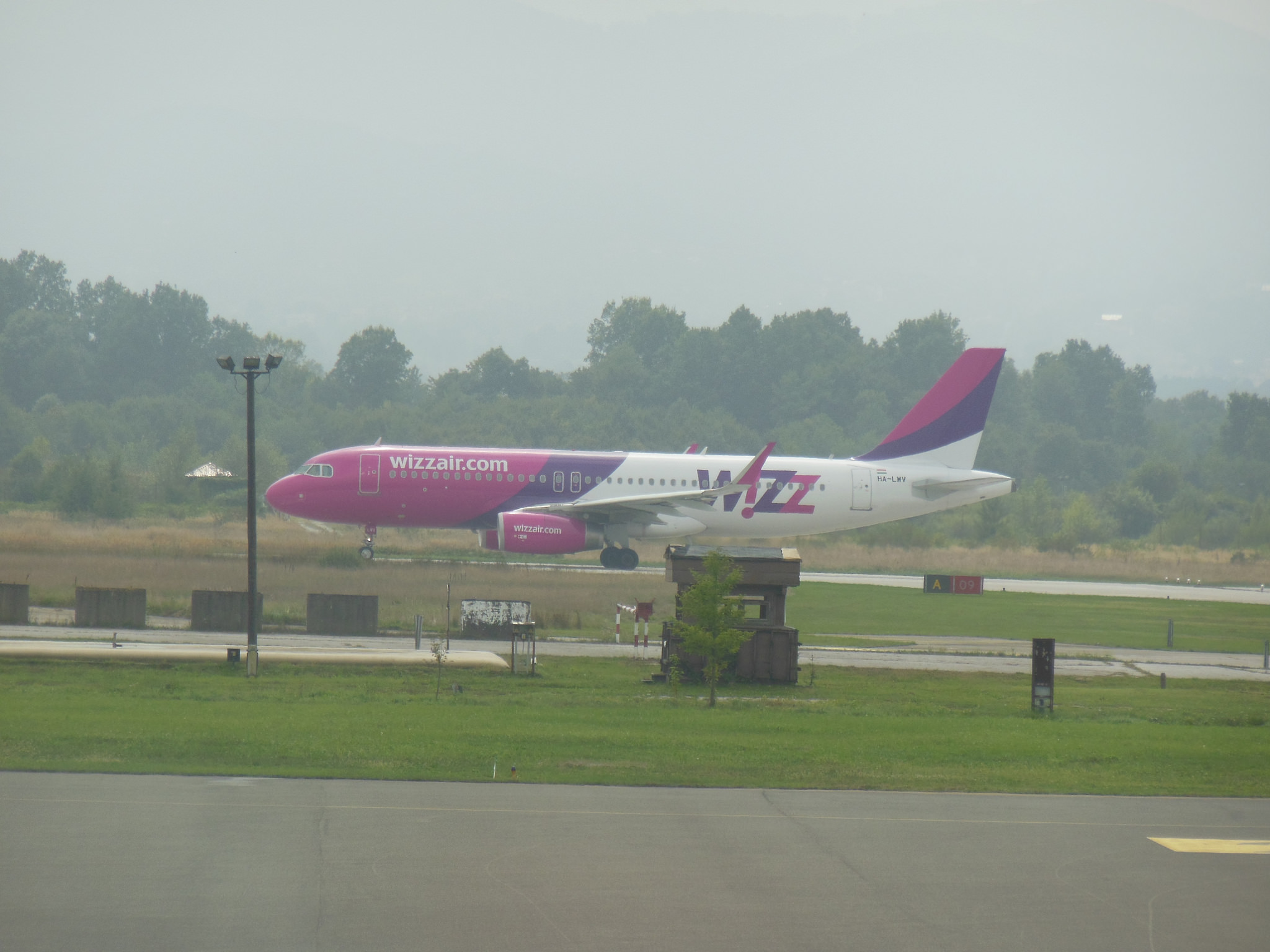 Wizz Air